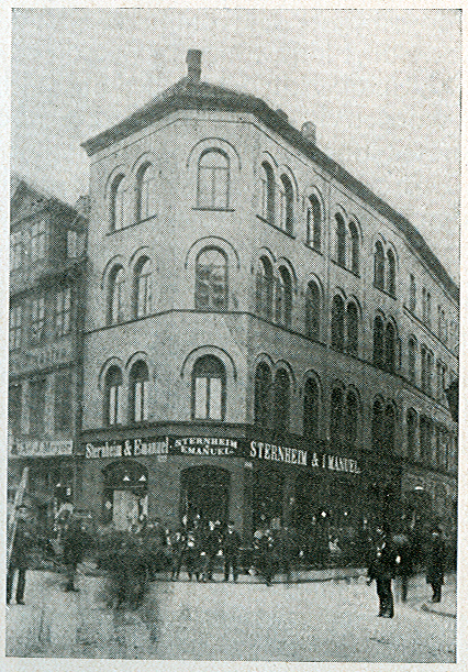 Scan einer Kopie eines Fotos des Stammhauses vom Kaufhaus Sternheim & Emanuel in Hannover, Große Packhofstraße 44, Ecke Osterstraße ...